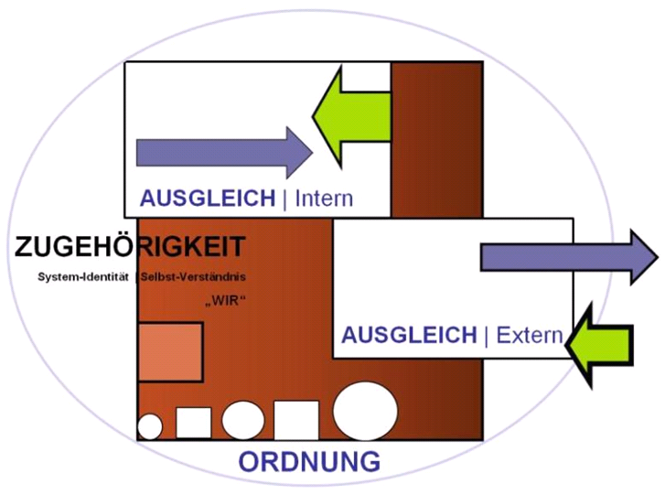 Dreierlei Hauptparameter sozialer Systeme in Bezug auf Funktionalität bzw. Dysfunktionalität derer.